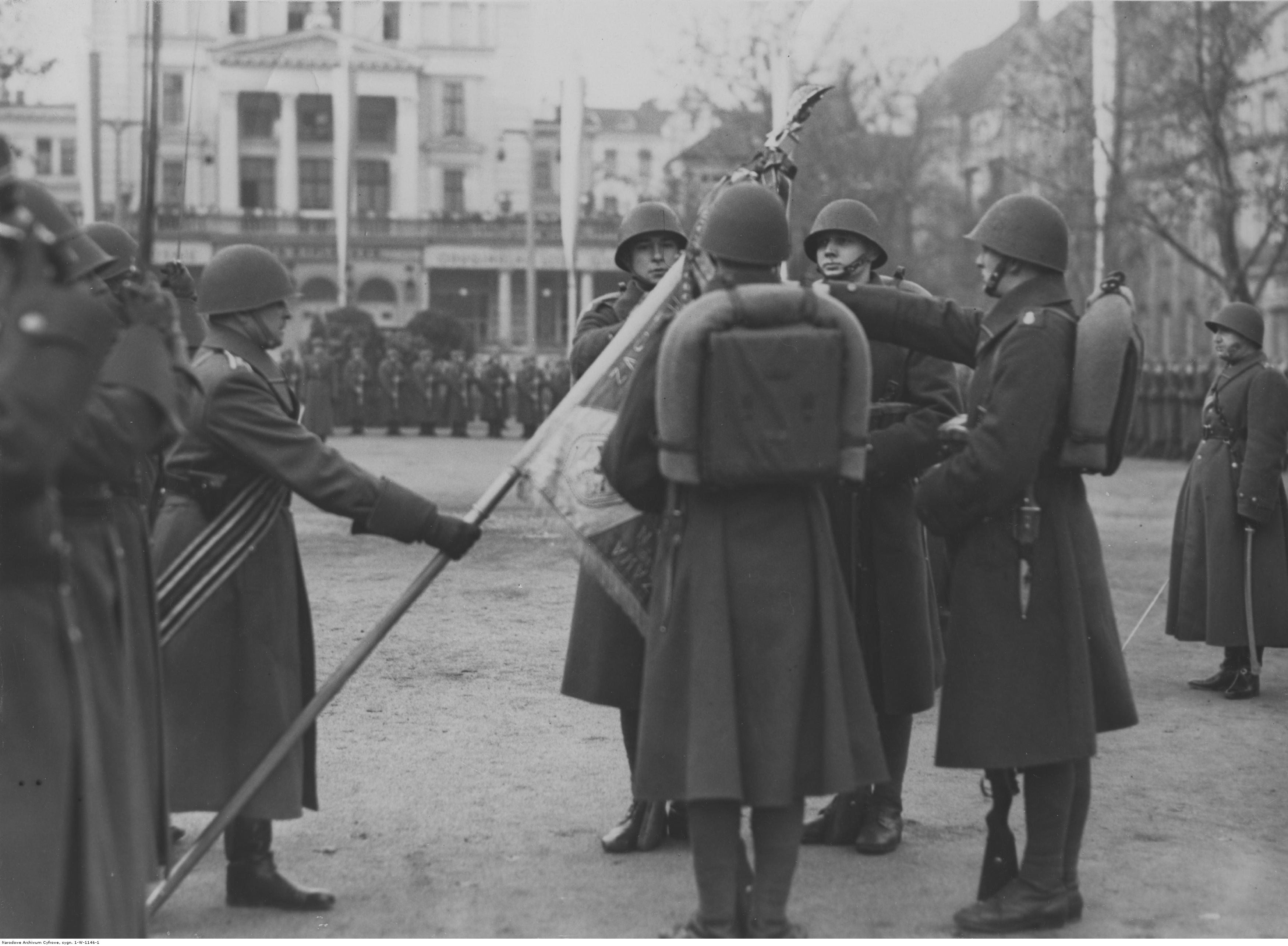 Przysięga podchorążych rezerwy 14 Dywizji Piechoty w Poznaniu. Przysięga na chorągiew pułku króla Rumunii Karola II. Koncern Ilustrowany Kurier Codzienny - Archiwum Ilustracji. Sygnatura: 1-W-1146-1